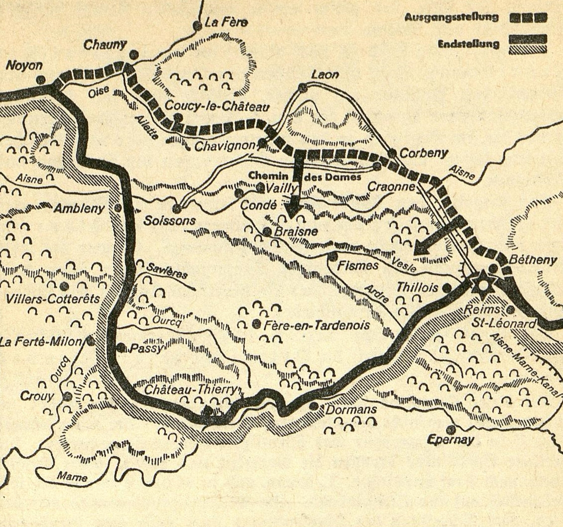 Chemin des Dames (Damenweg), Ausgangs-und Endstellung der deutschen Verbände